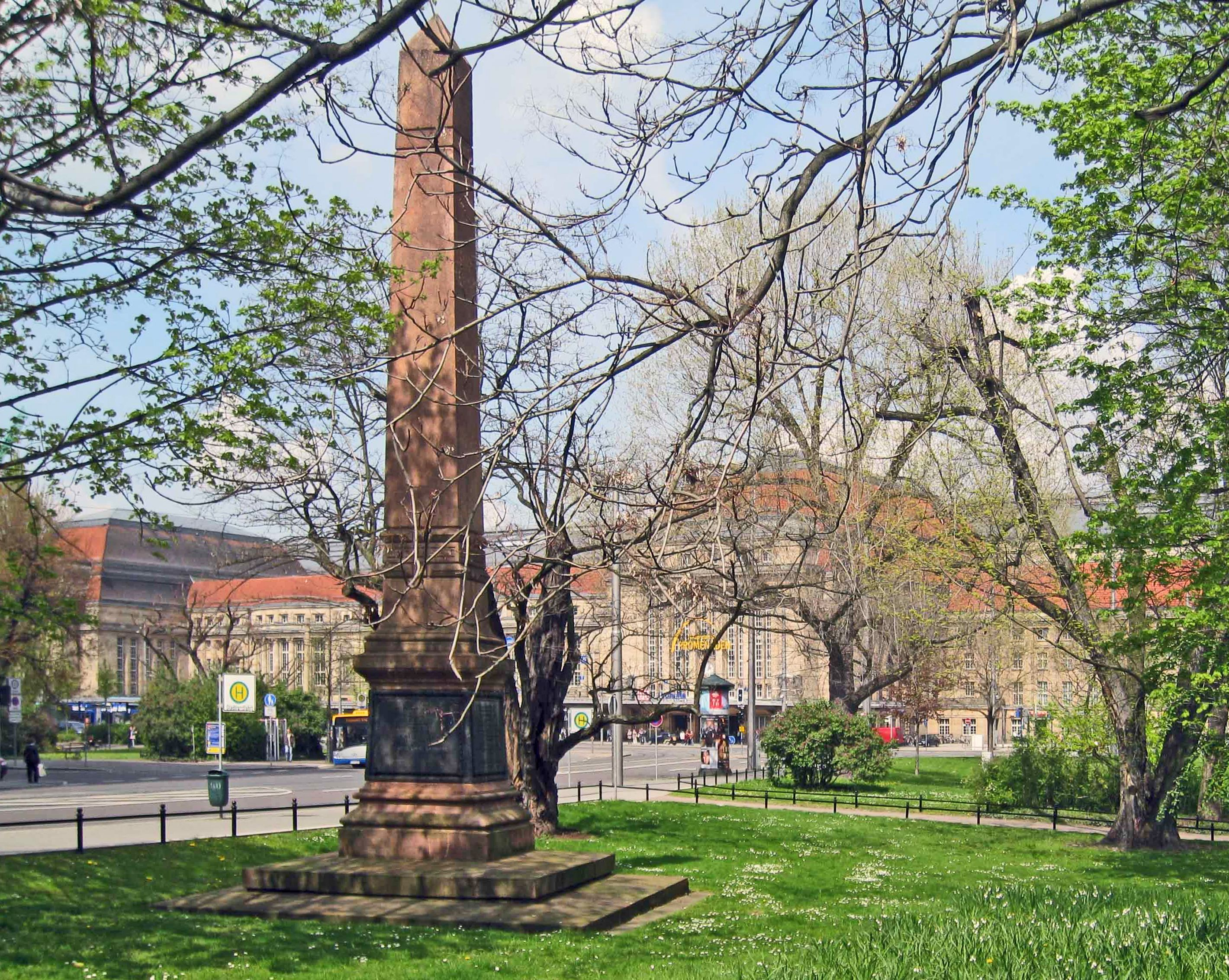 Eisenbahndenkmal Obelisk zur Erinnerung an die Leipzig-Dresdner Eisenbahn 1839, Entwurf von C.G. Aeckerlein, errichtet 1878, Leipzig Goethestraße, im Hintergrund ist der Leipziger Hauptbahnhof zu sehen